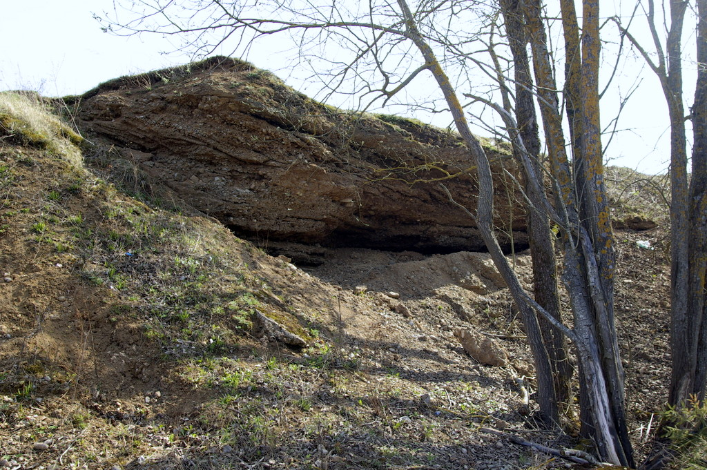 Tornimäe panga lääneküljel põhimasiivist emmaldunud pangas.